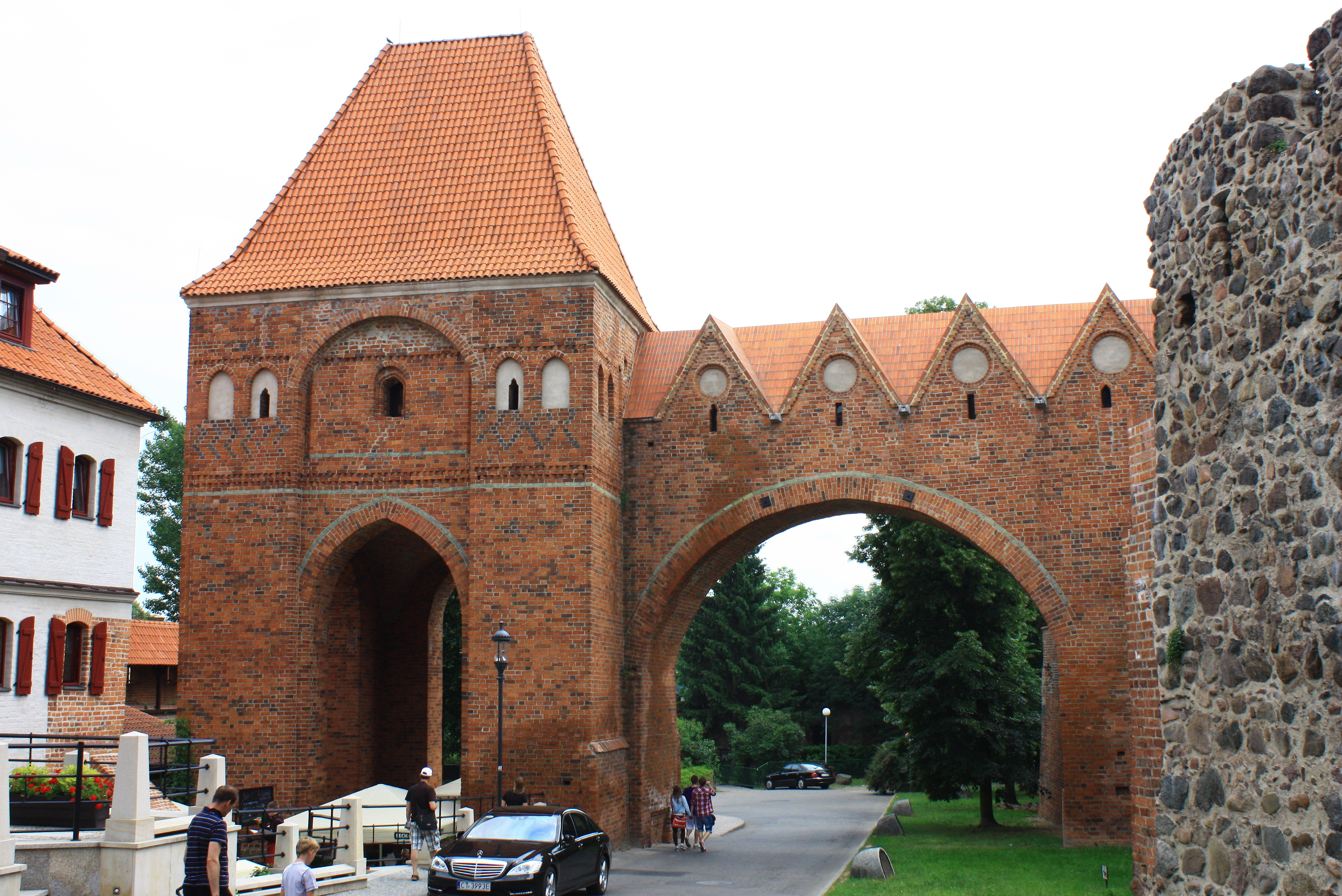 Toruń, gdanisko „Dansker” (wieża ustępowa z gankiem), kon. XIII